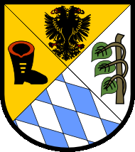 Wappen von Ried im Innkreis, selbst gezeichnet. nach: und AEIOU Erstellt von: nd Erstellt am: 9. Oktober 2003 Erstellt mit: CorelDraw Creative Commons Share Alike GNU-FDL Rechtlicher Status Verwendung in der Wikipedia gemäß den Bestimmungen von § 4a OÖ. LGBl.Nr. 152/2001 Bei Weiterverwendung sind die Bestimmungen aus § 4a Abs. 3 OÖ. LGBl.Nr. 152/2001 zu beachten